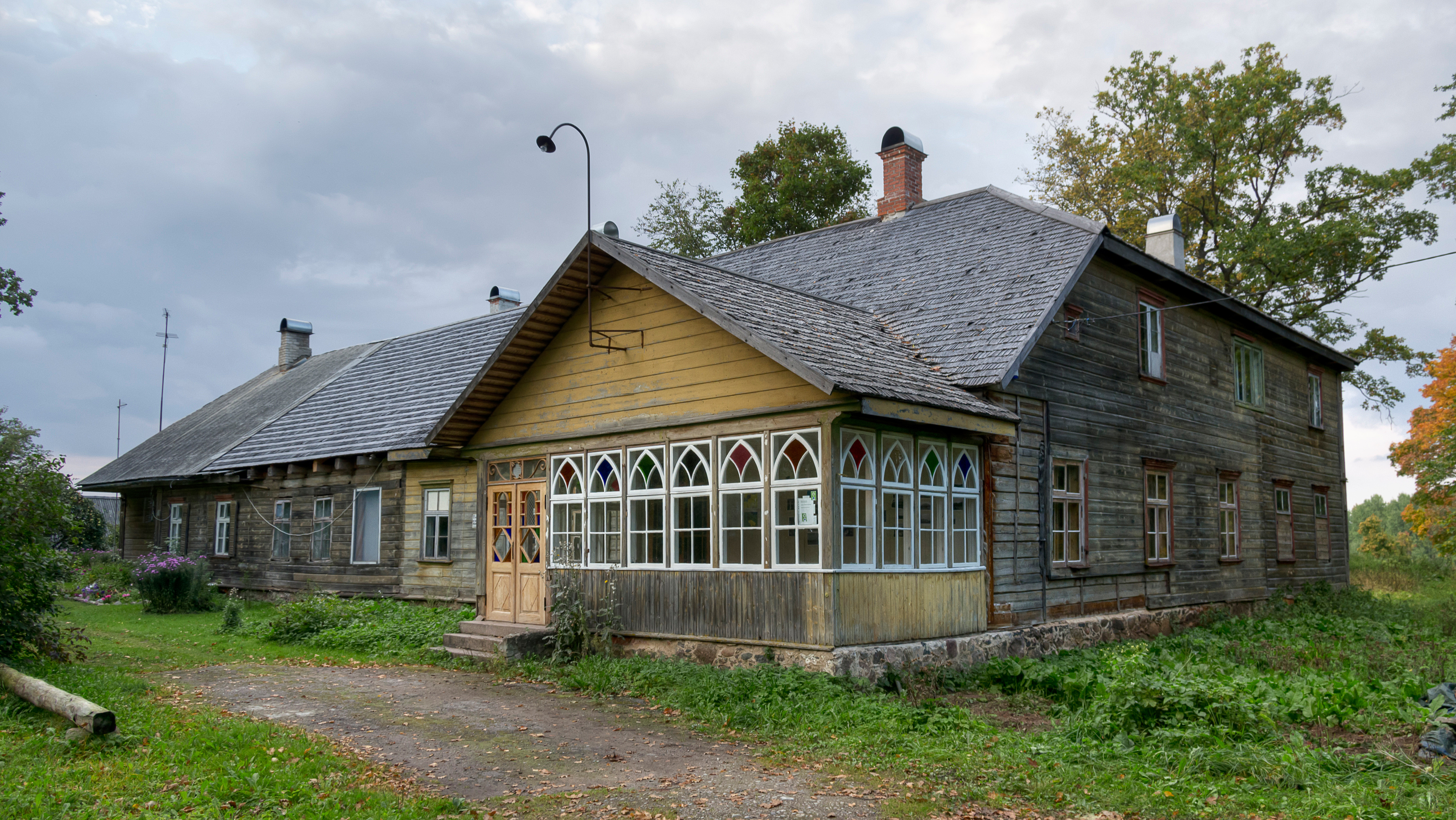 Vana-Kirepi mõisa peahoone 18.-19. saj.